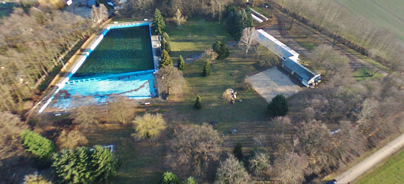 Freibad Hammermühle, Aufteilung von 1966 bis 2017, Luftbild vom 08.01.2018